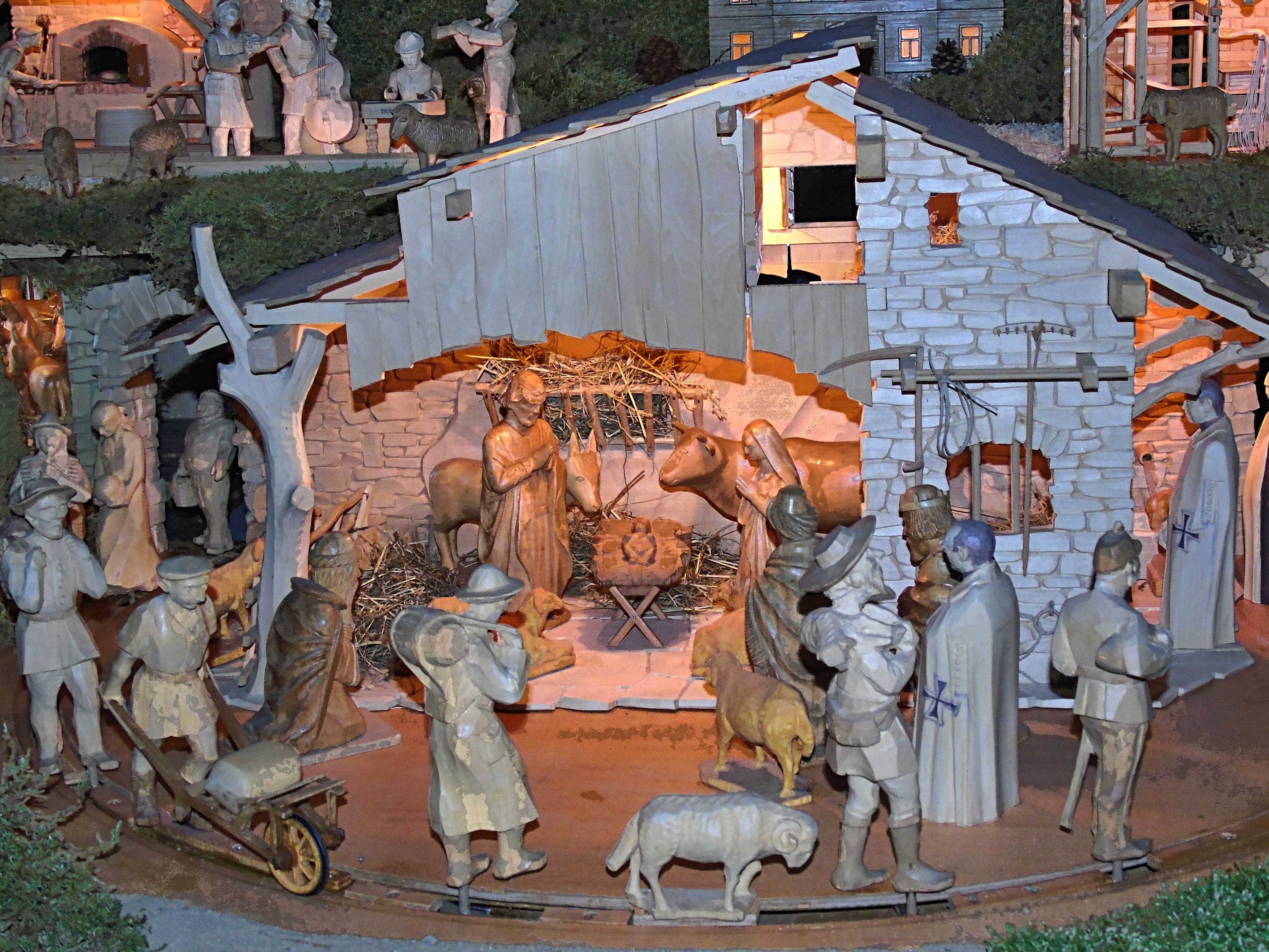 Jesličky